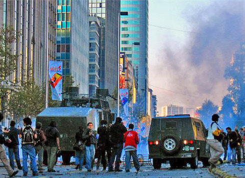 Carabineros dispersan manifestantes durante las protestas escolares